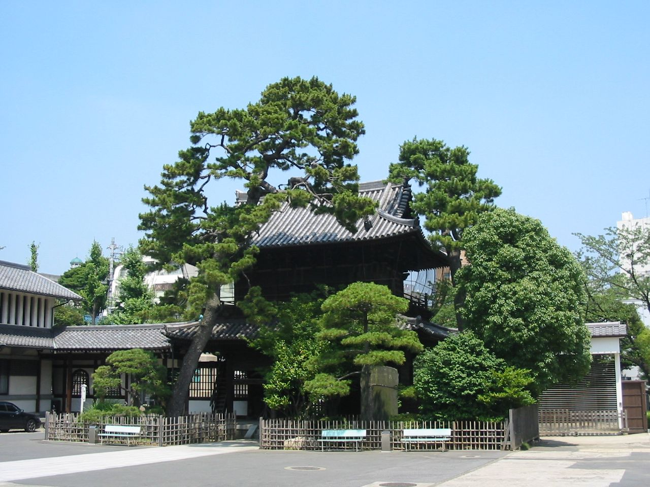 Sengakuji temple main gate, Tokyo